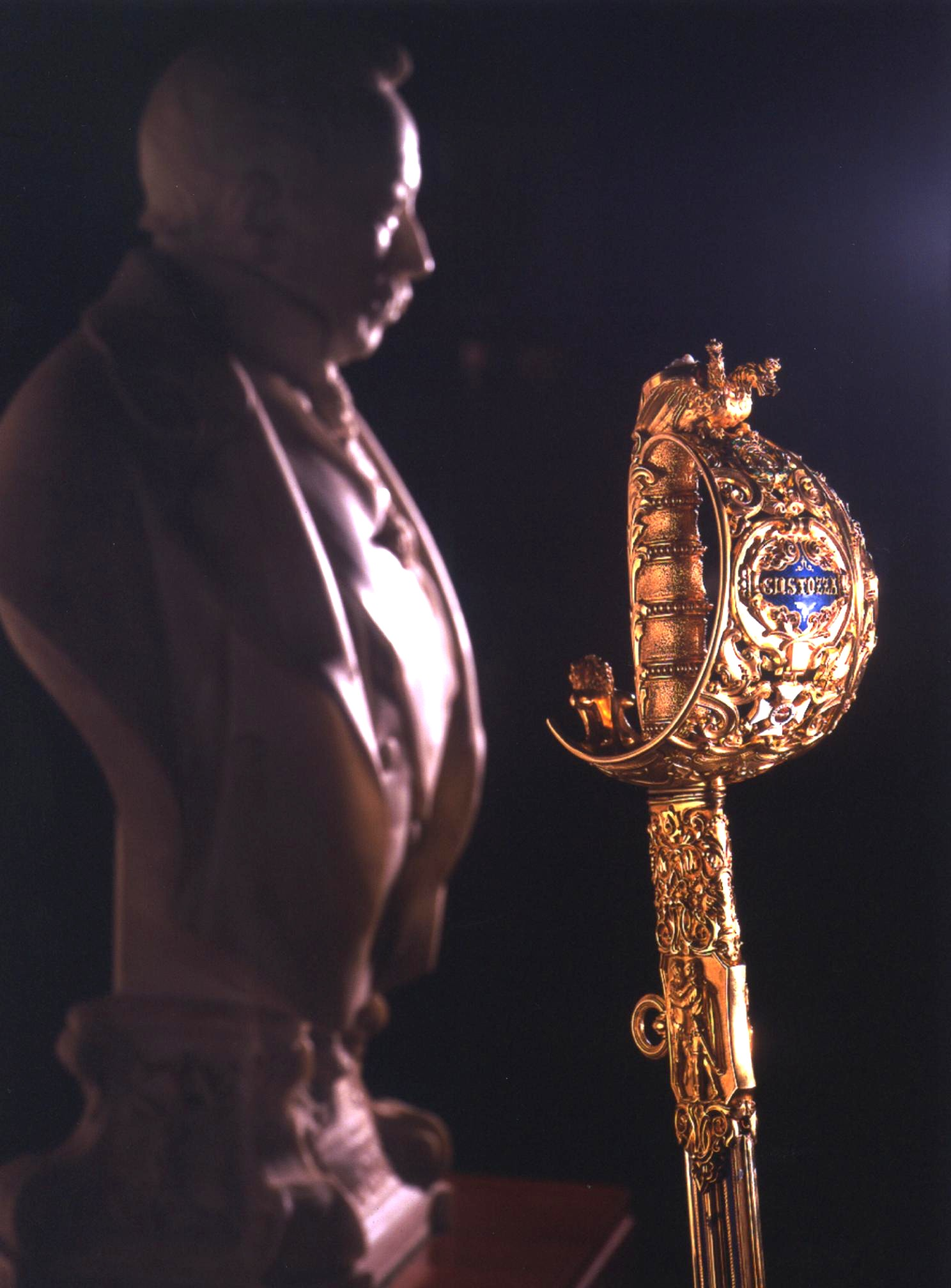 Ehrensäbel des Feldmarschall Josef Wenzel Radetzky von Radetz im Heeresgeschichtlichen Museum in Wien